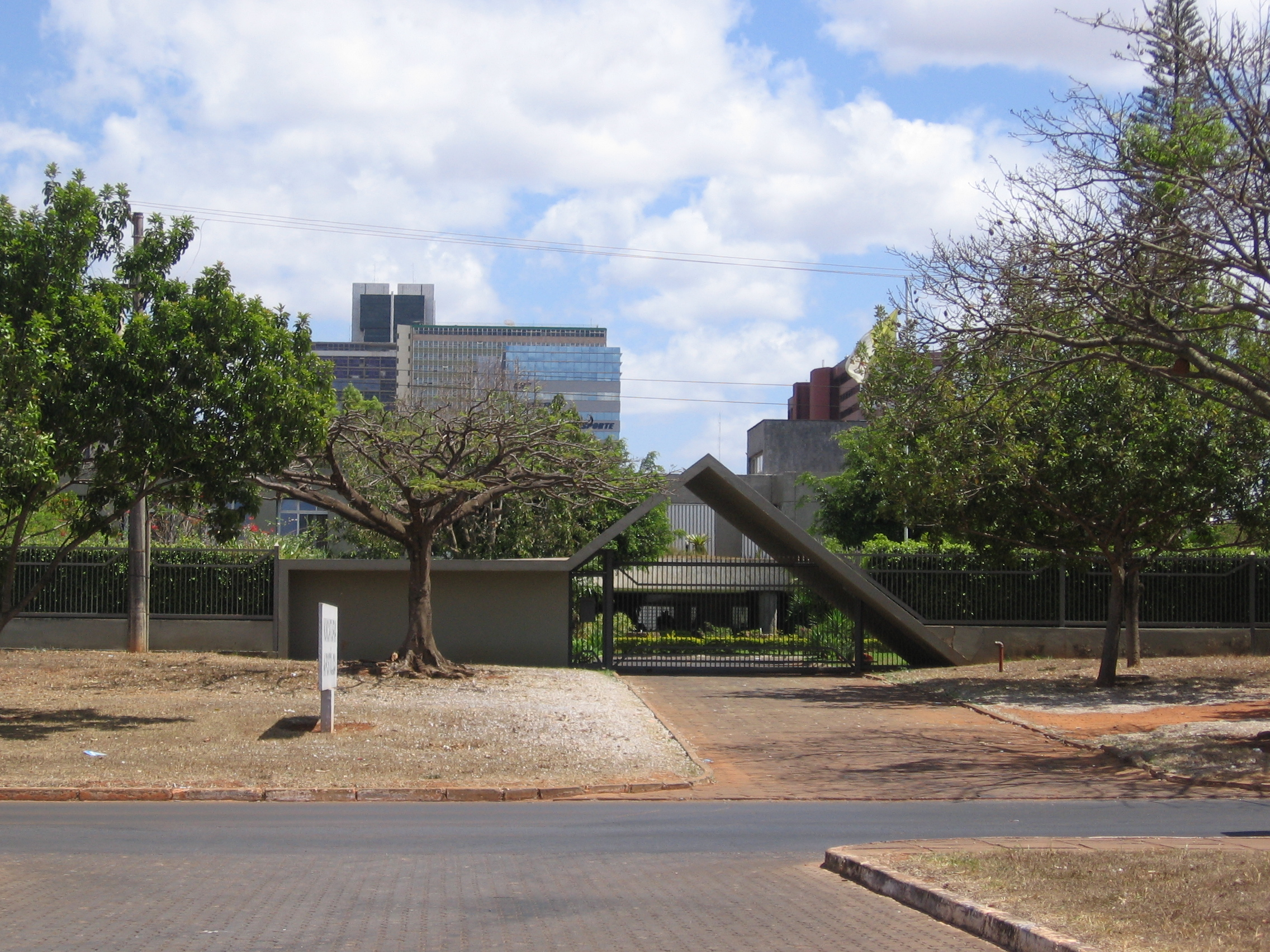 Apostolic Nunciature in Brasilia, Brazil